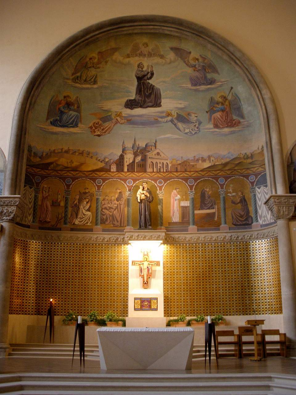 Iglesia de San Antonio (PP Capuchinos), en Pamplona